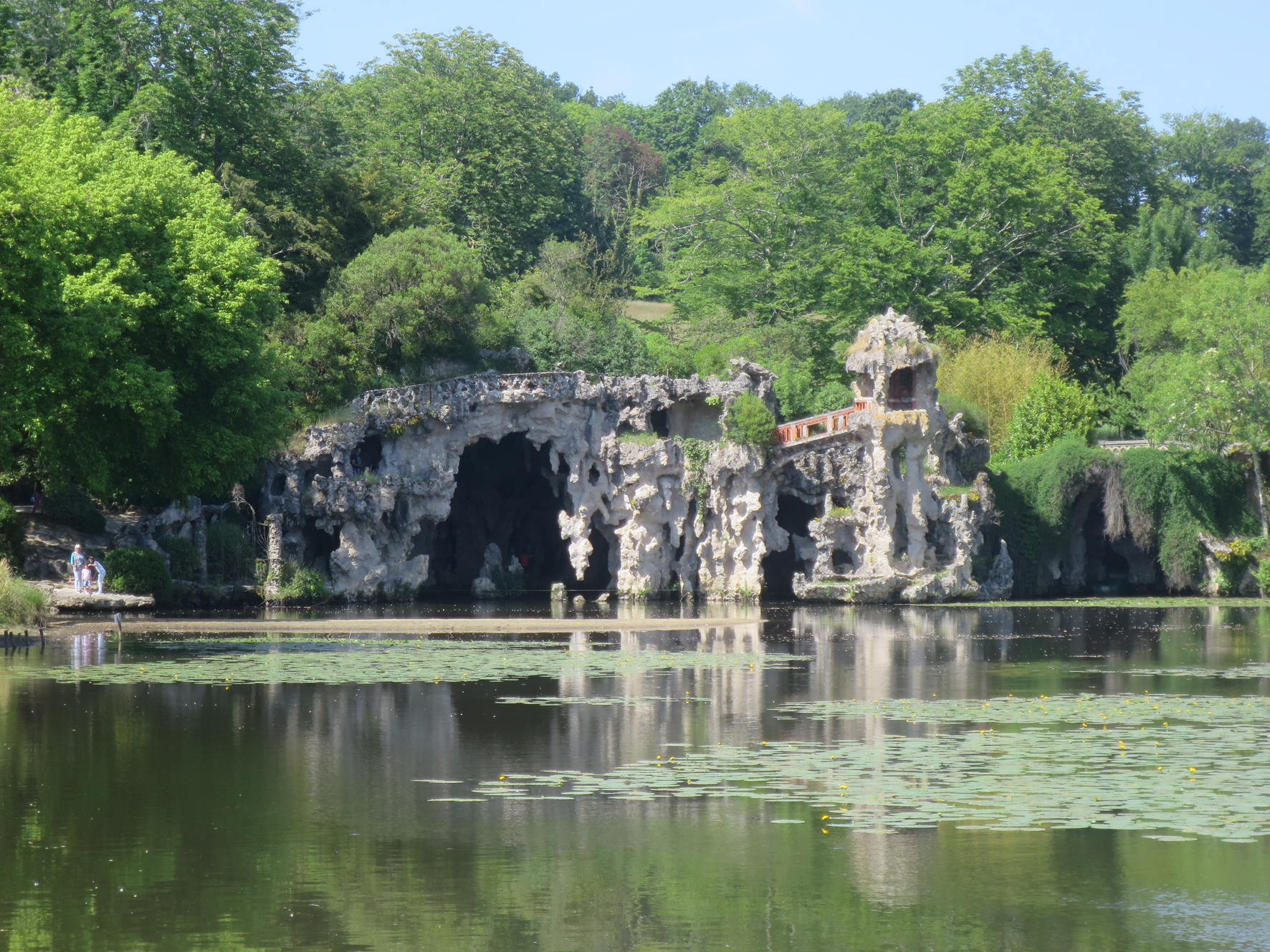 Park Majolan: Blick über den See auf die Grotte